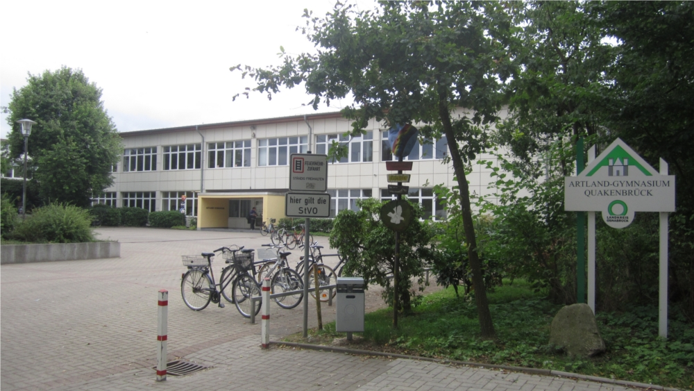 Das Artland-Gymnasium von schräg vorne mit Schild